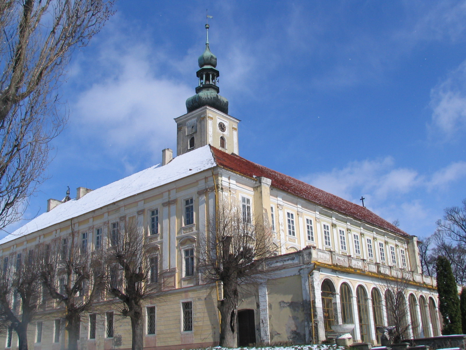 Schloss Klein Öls, ehemaliger Sitz der Familie Yorck von Wartenburg